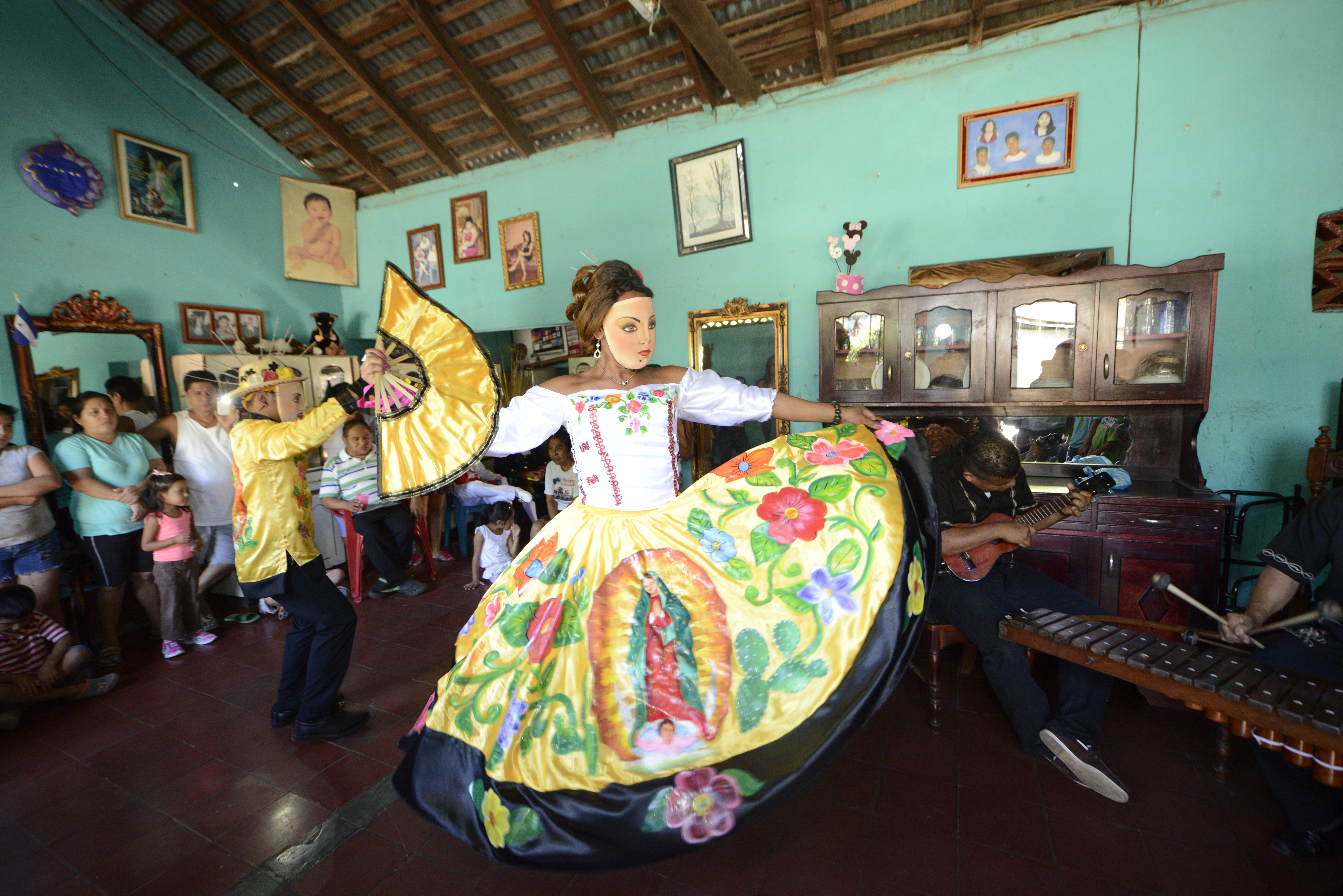 fotos de baile de negras, Masaya Nicaragua tomada por Maynor Valenzuela